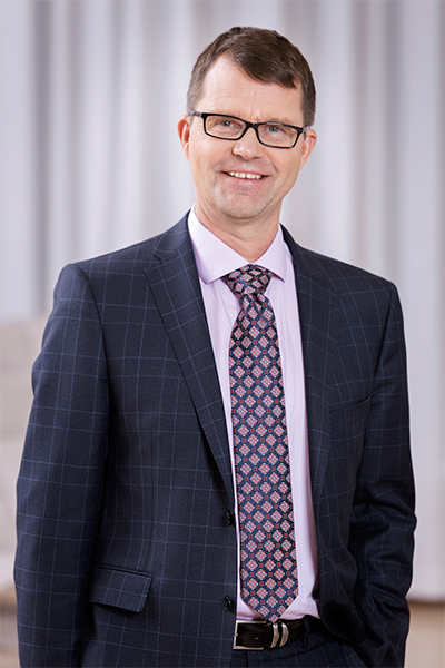 Ruusunen kuvattuna vuoden 2015 lopussa Fingridin vuosikertomus-julkaisua varten.